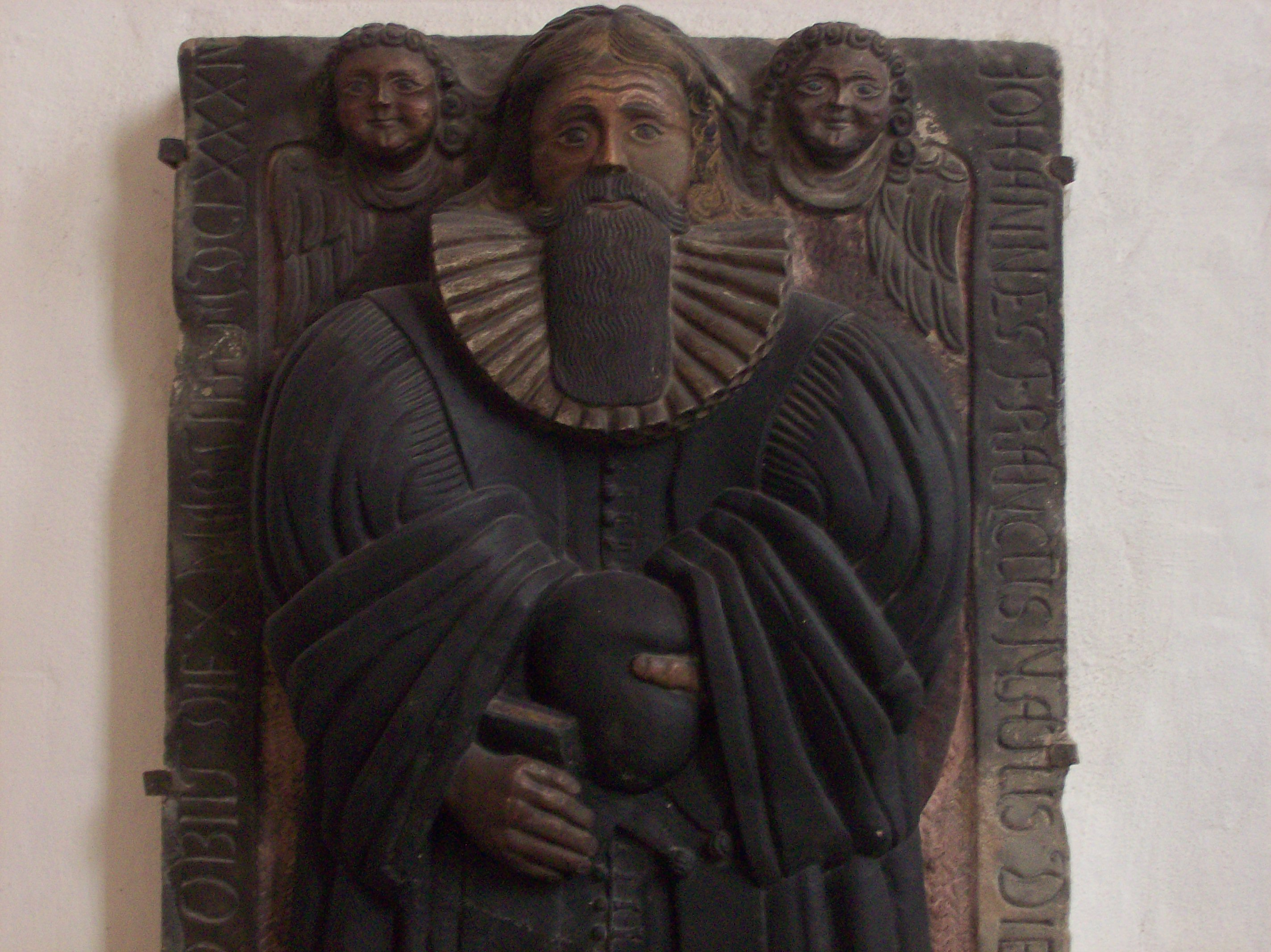 Grabplatte des Superintendent Johannes Francke (1604-1684) in der Stadtkirche zu Weida, Thüringen